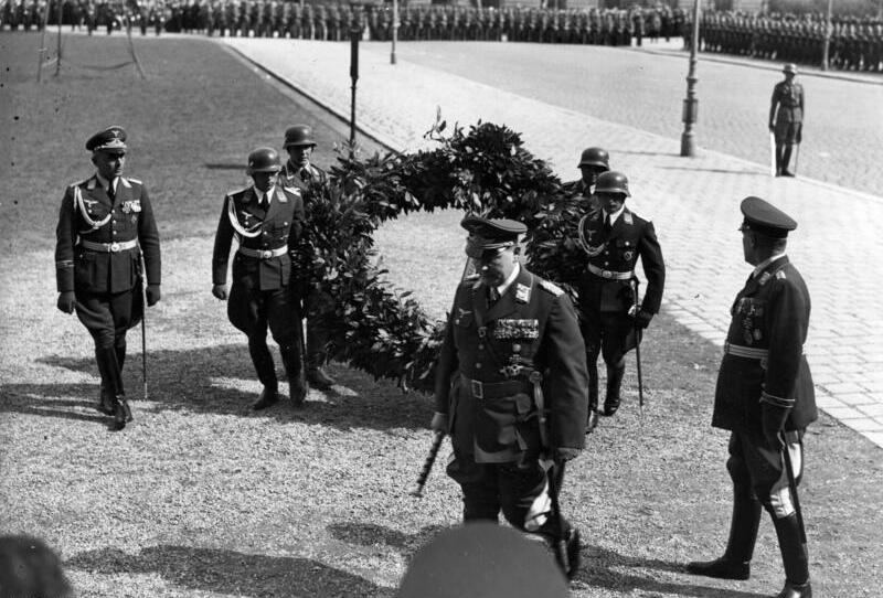 Wien, Göring ehrt Gefallene des Weltkrieges Generalfeldmarschall Göring ehrte die Toten in Wien. Am Sonntagvormittag begab sich Generalfeldmarschall Göring zum Heldenmal in Wien, um hier einen Kranz zu Ehren der im Weltkrieg gefallenen deutsch-österreichischen Soldaten niederzulegen. U.B.z. den Generalfeldmarschall auf dem Wege zum Ehrenmal. Bei Abdruck nennen: Scherl Bilderdienst, Berlin 27.3.38 Abgebildete Personen: Göring, Hermann: Reichsmarschall, Oberbefehlshaber der Luftwaffe, Ministerpräsident von Preußen, Deutschland